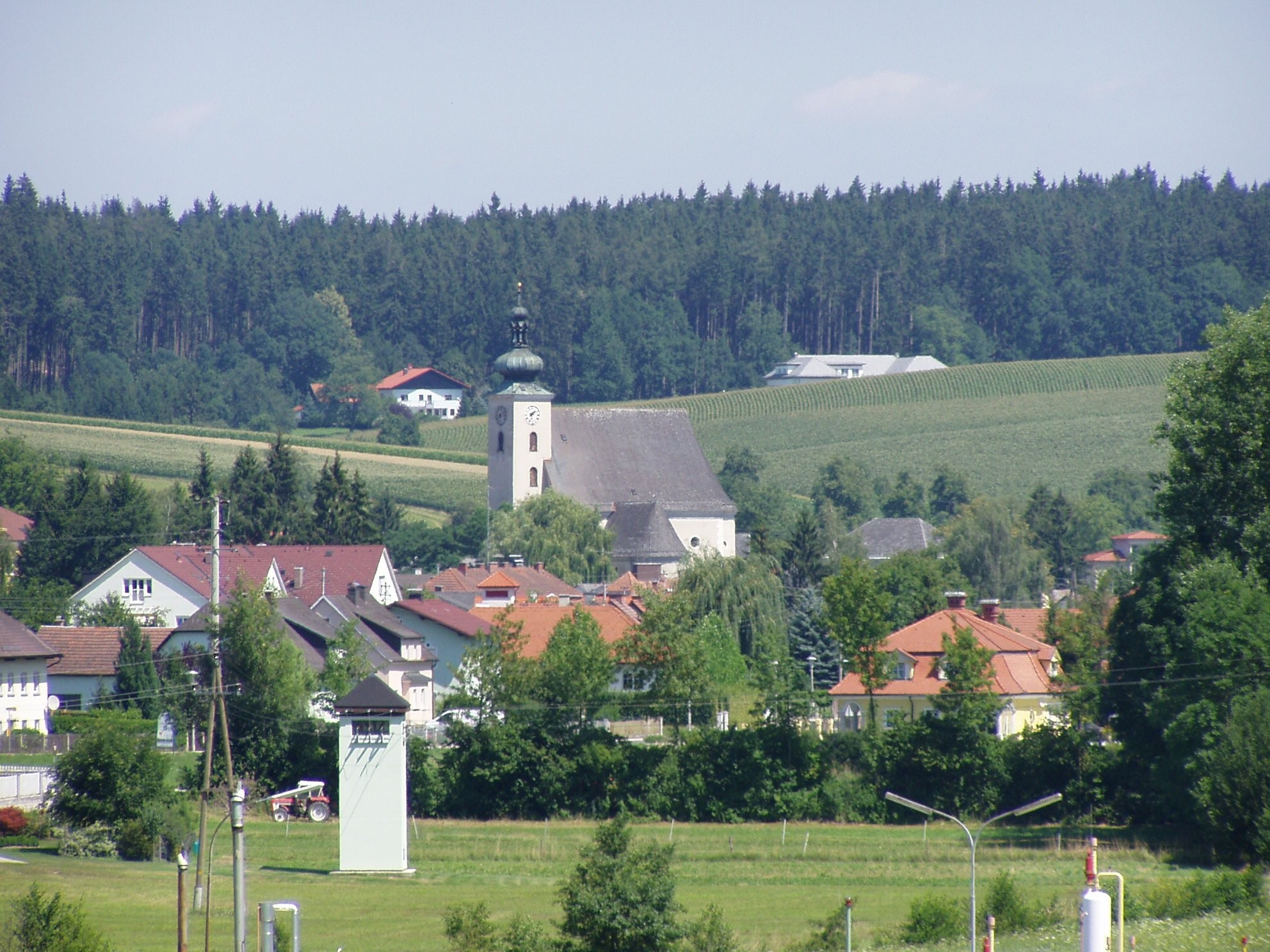 Offenhausen